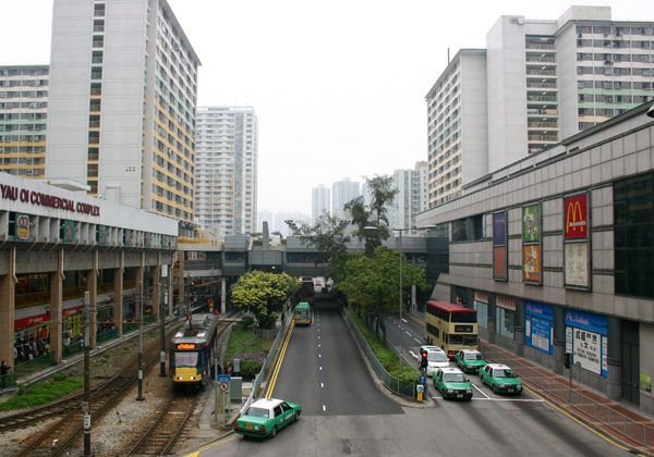 中文（香港）: 屯門鄉事會路，友愛邨與安定邨之間。